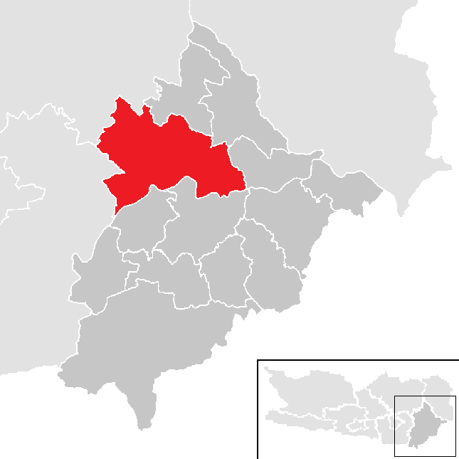 Bezirk Völkermarkt